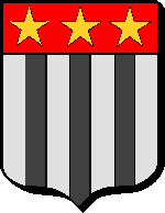 BALAZUC